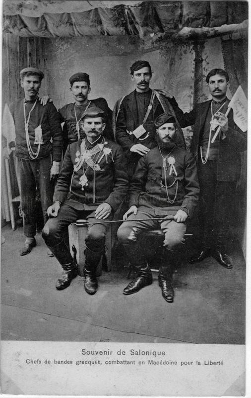 Гръцки андарти след Младотурската революция в 1908 г. Седнали Михаил Цондос и Евангелос Франгядакис